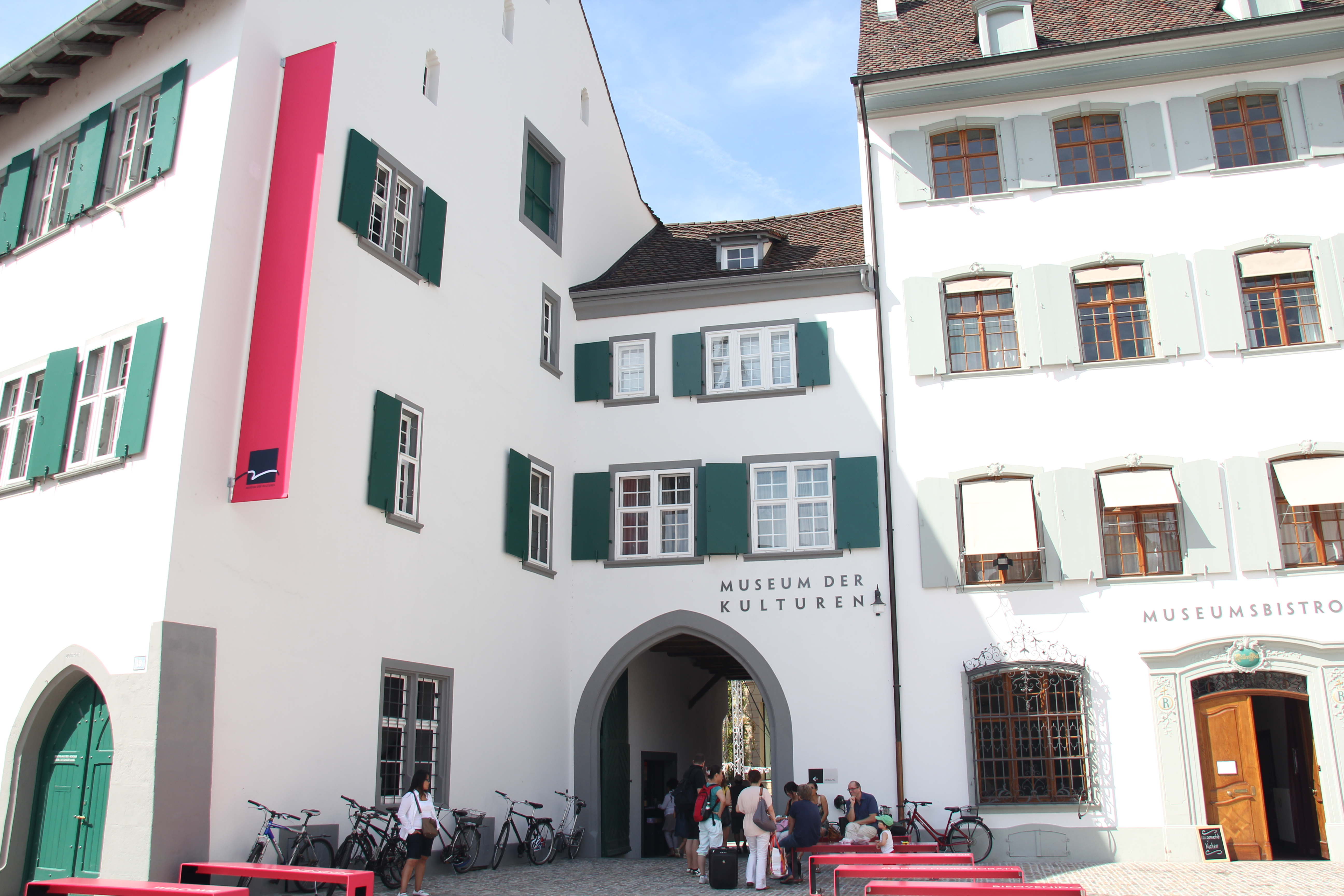 Museum der Kulturen